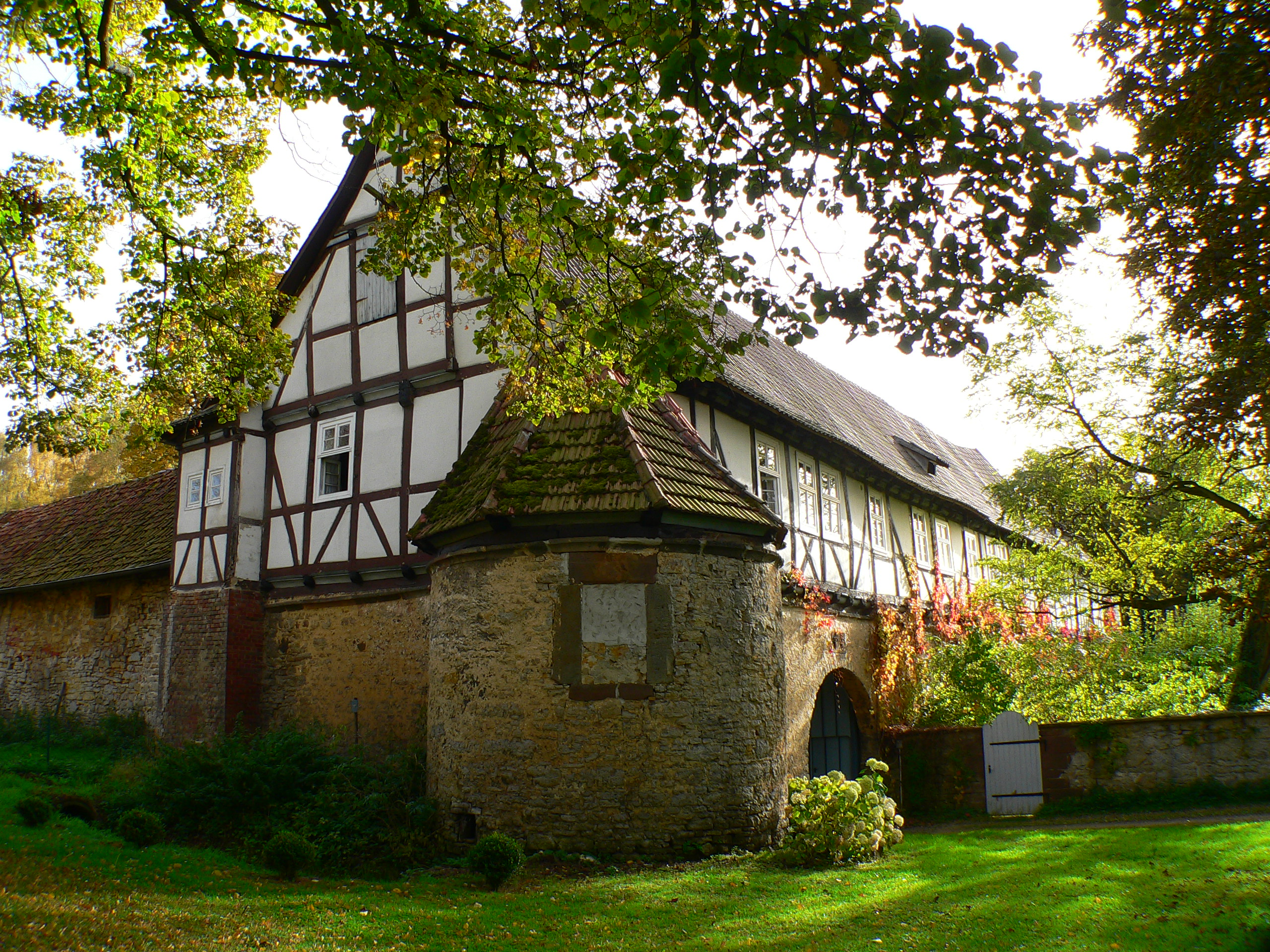 Junkershof Meimbressen in Calden-Meimbressen im Landkreis Kassel, Hessen, Deutschland